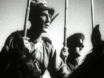 Кадр из кинофильма «Тихий Дон»